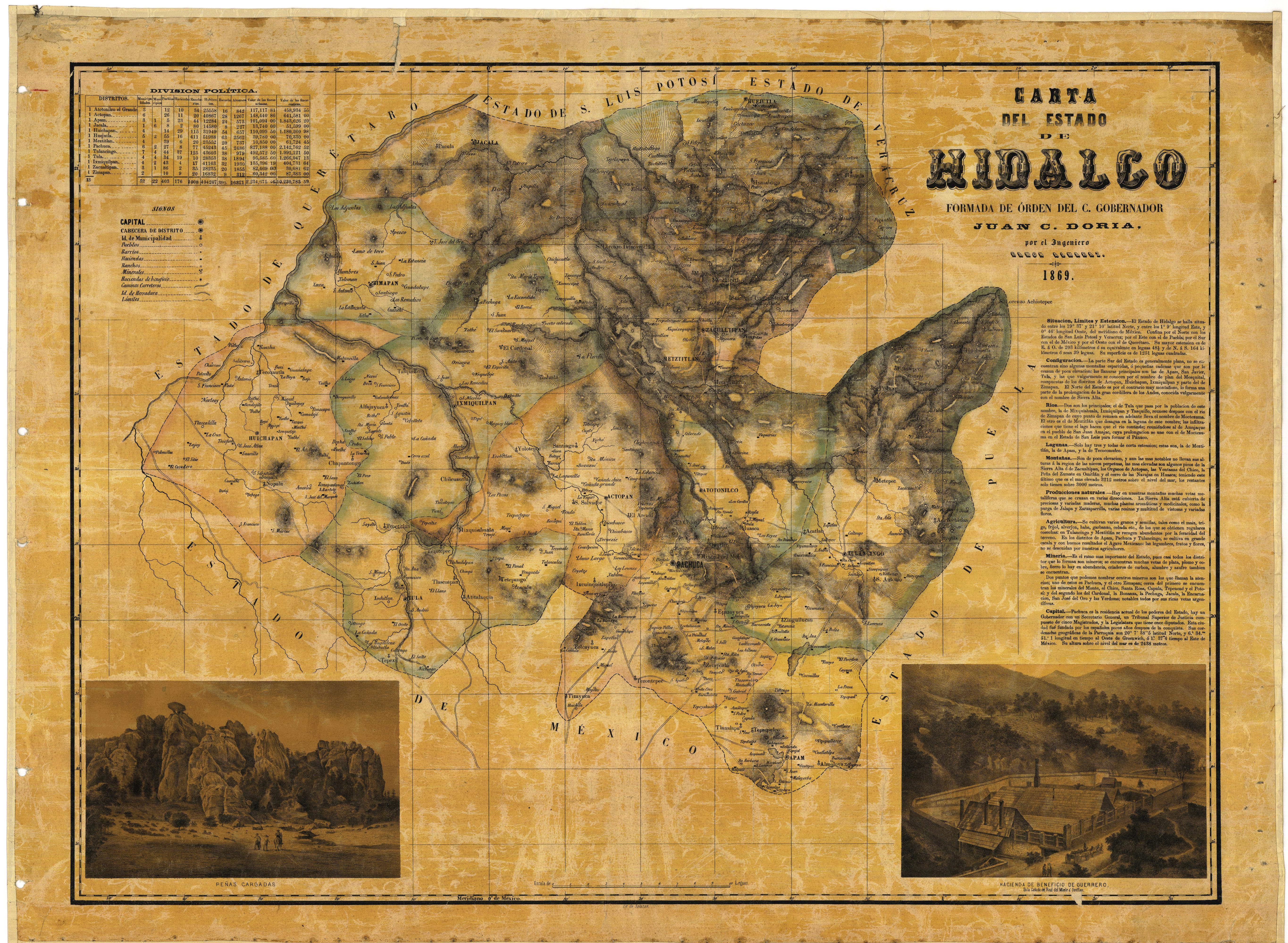 Primer mapa del Estado de Hidalgo levantado por el gobernador Juan C. Doria en 1869.